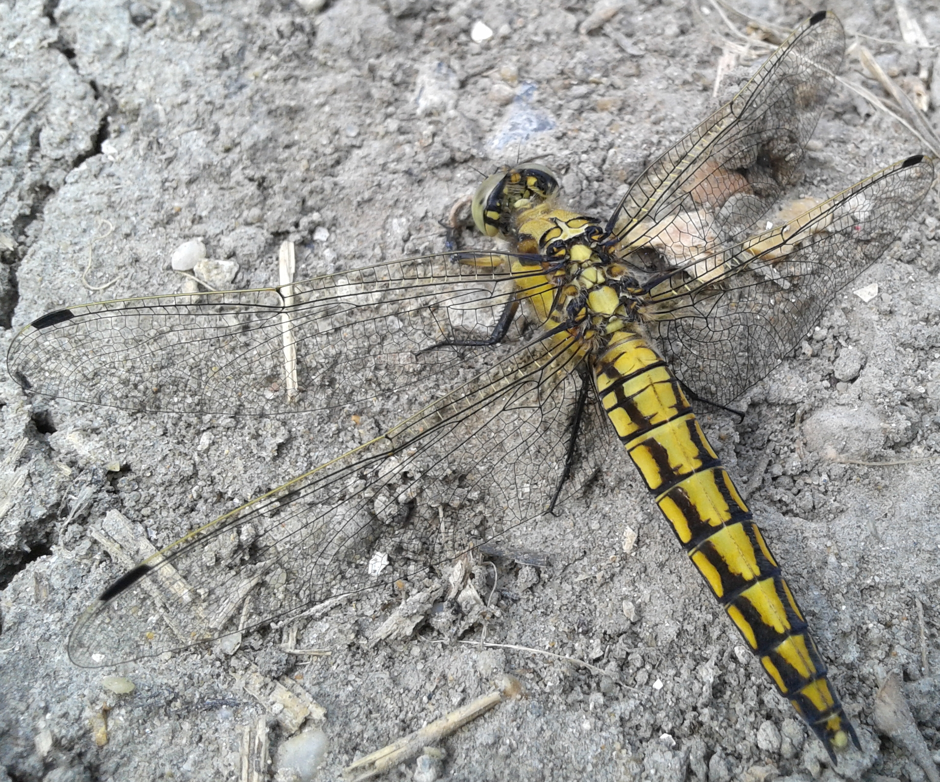 Orthetrum cancellatum, Orthétrum réticulé (image rogné) 59210